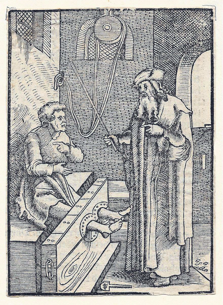 Holzschnitt eines anonymen deutschen Meisters, um 1528, der die Signatur Hans Schäufeleins benutzt und daher als Pseudoschäufelein bezeichnet wird.